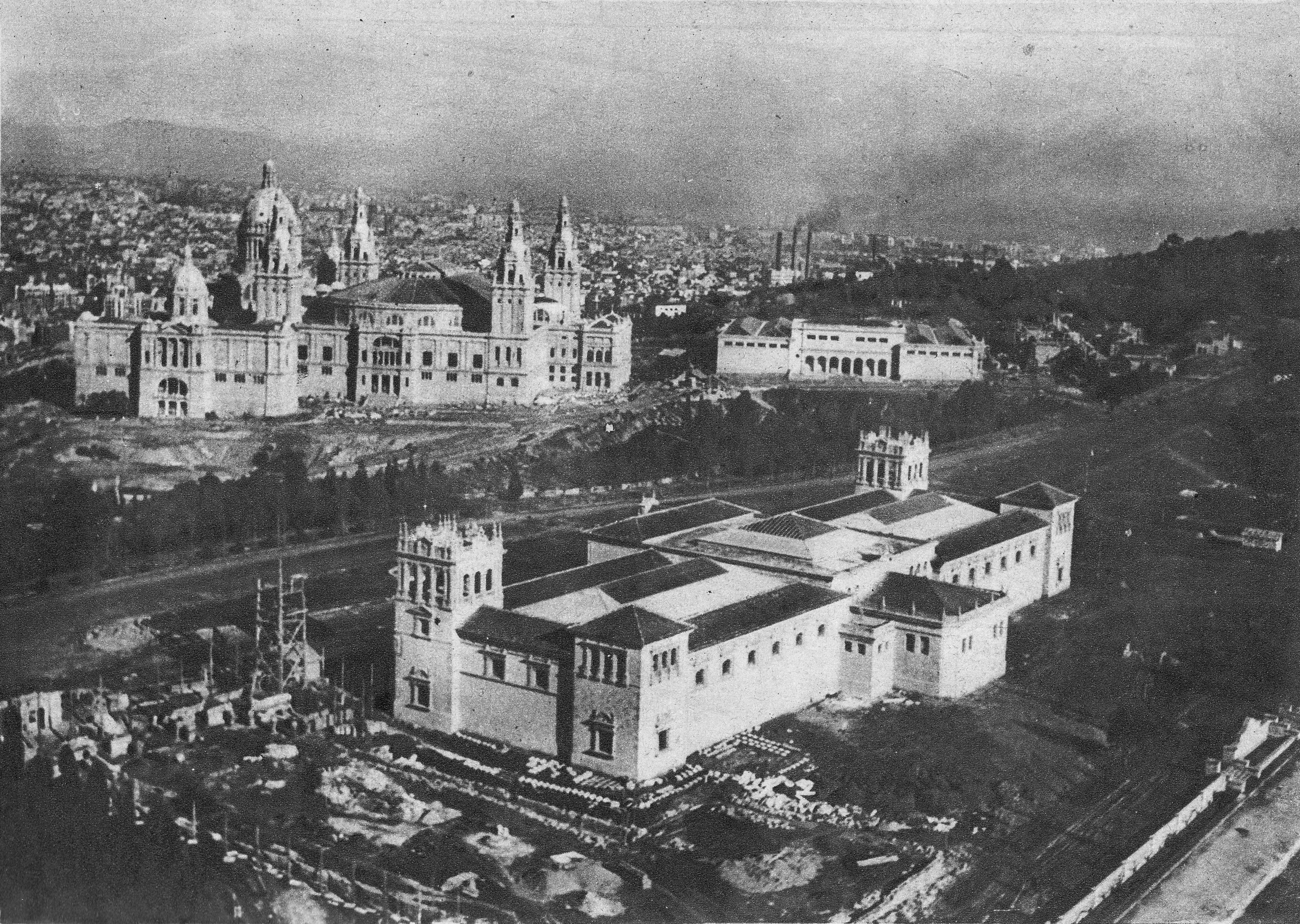 Palau d'Espanya (Barcelona-Catalunya), obra d'Antoni Darder fet en 1927 per a l'Exposició Universal de Barcelona-1929. Enderrocat en 1942.